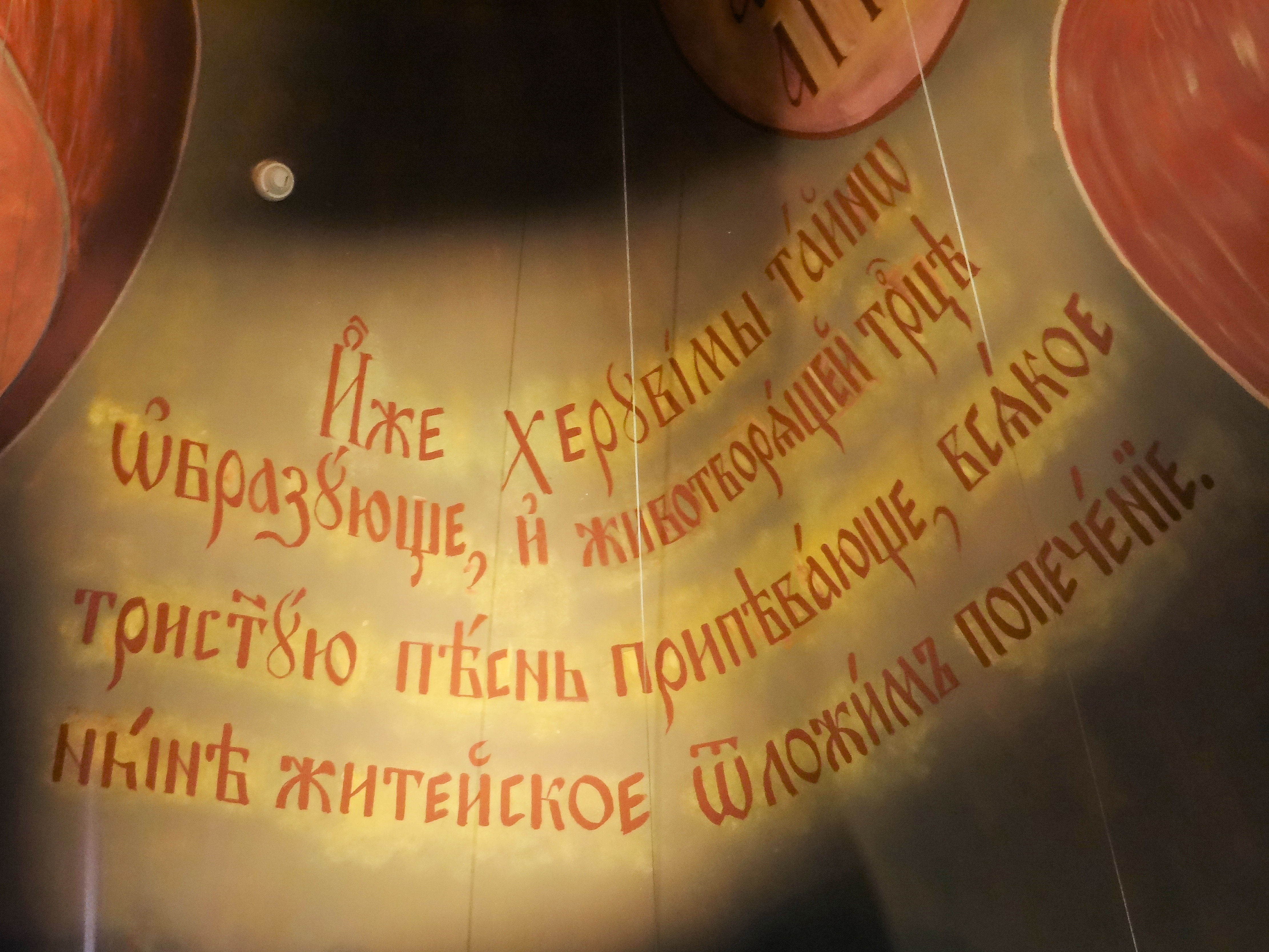 Muzeum ikon w Supraślu - fragment sklepienia jednej z sal ekspozycyjnych